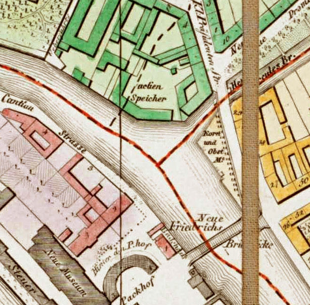 Situationsplan des Aktienspeichers in Berlin, 1846.